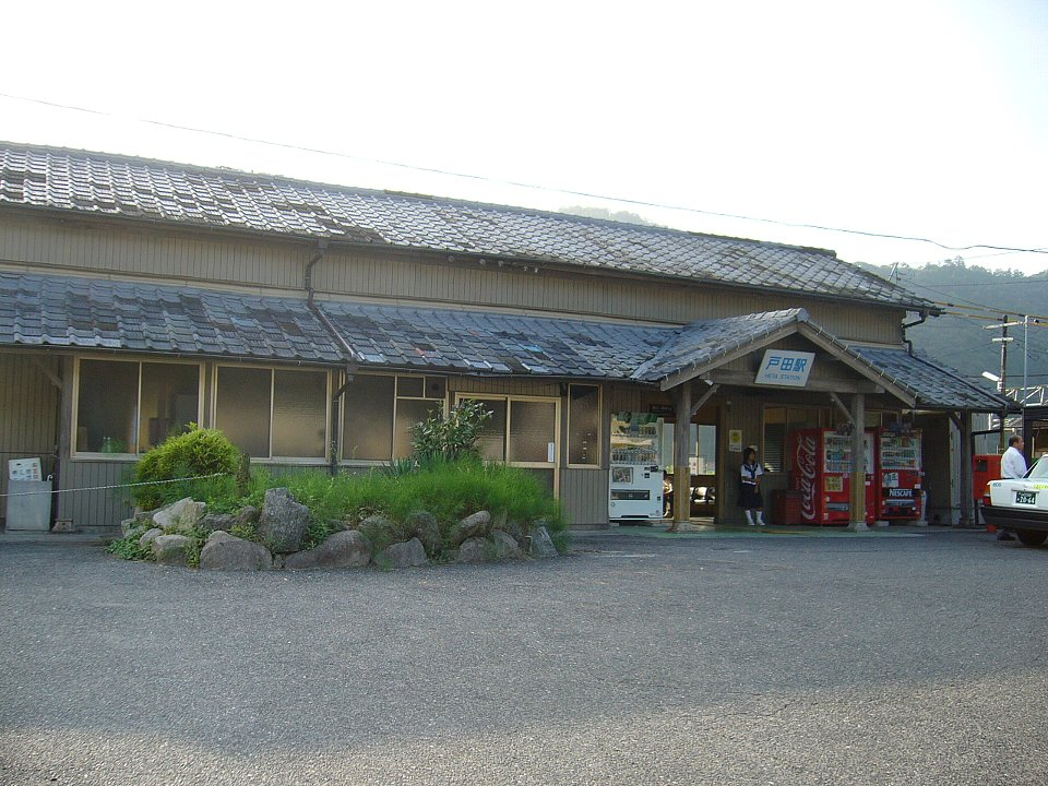 山陽本線戸田駅 駅舎